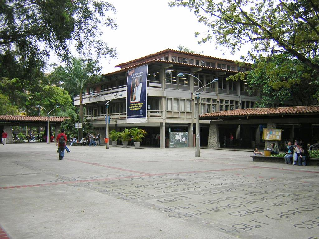 Bloque 9 y Plazuela Fernando Barrientos, Universidad de Antioquia, Medellín, Colombia (esta foto la tome yo, y la libero al dominio público)